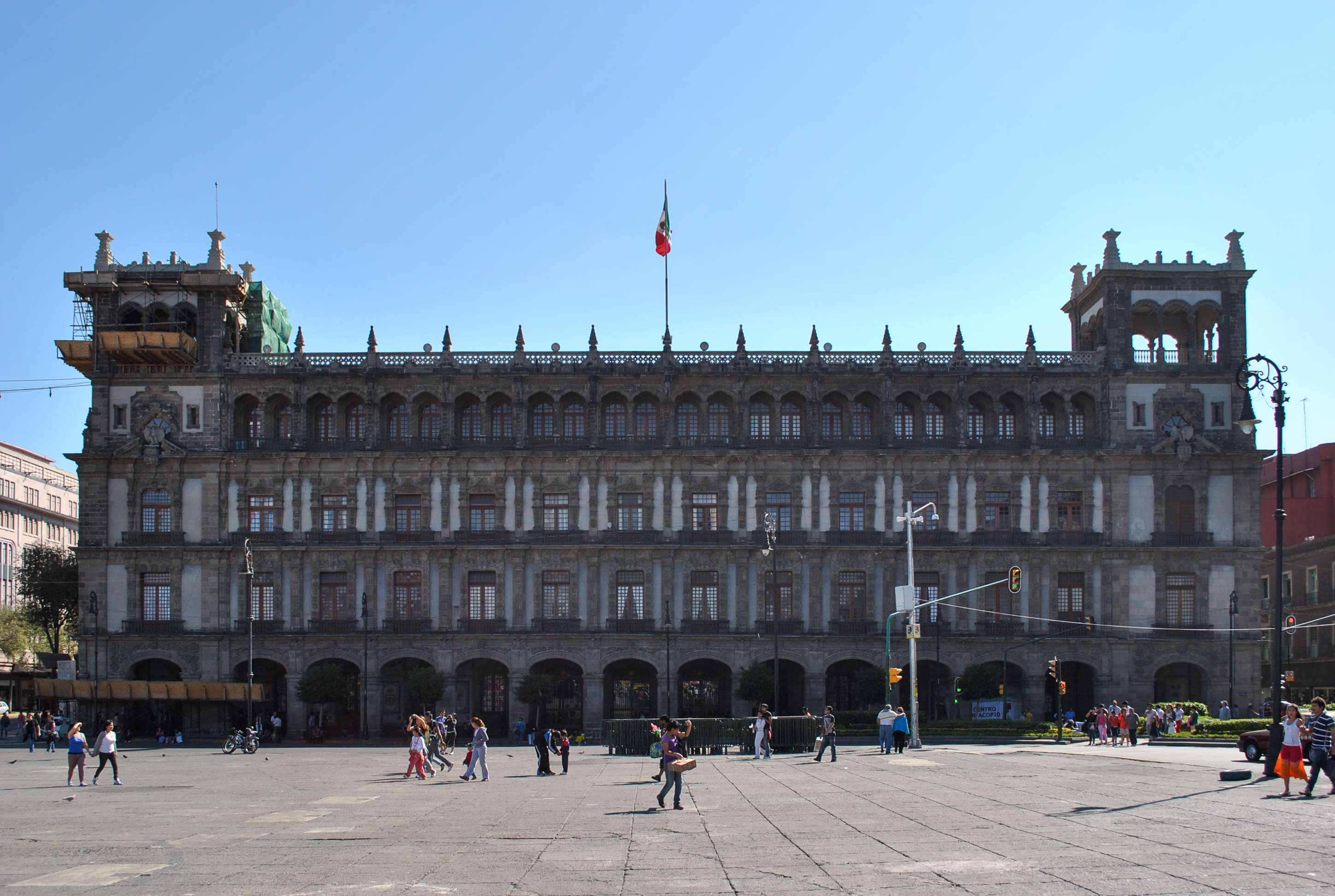 Vista frontal del Antiguo Palacio del Ayuntamiento